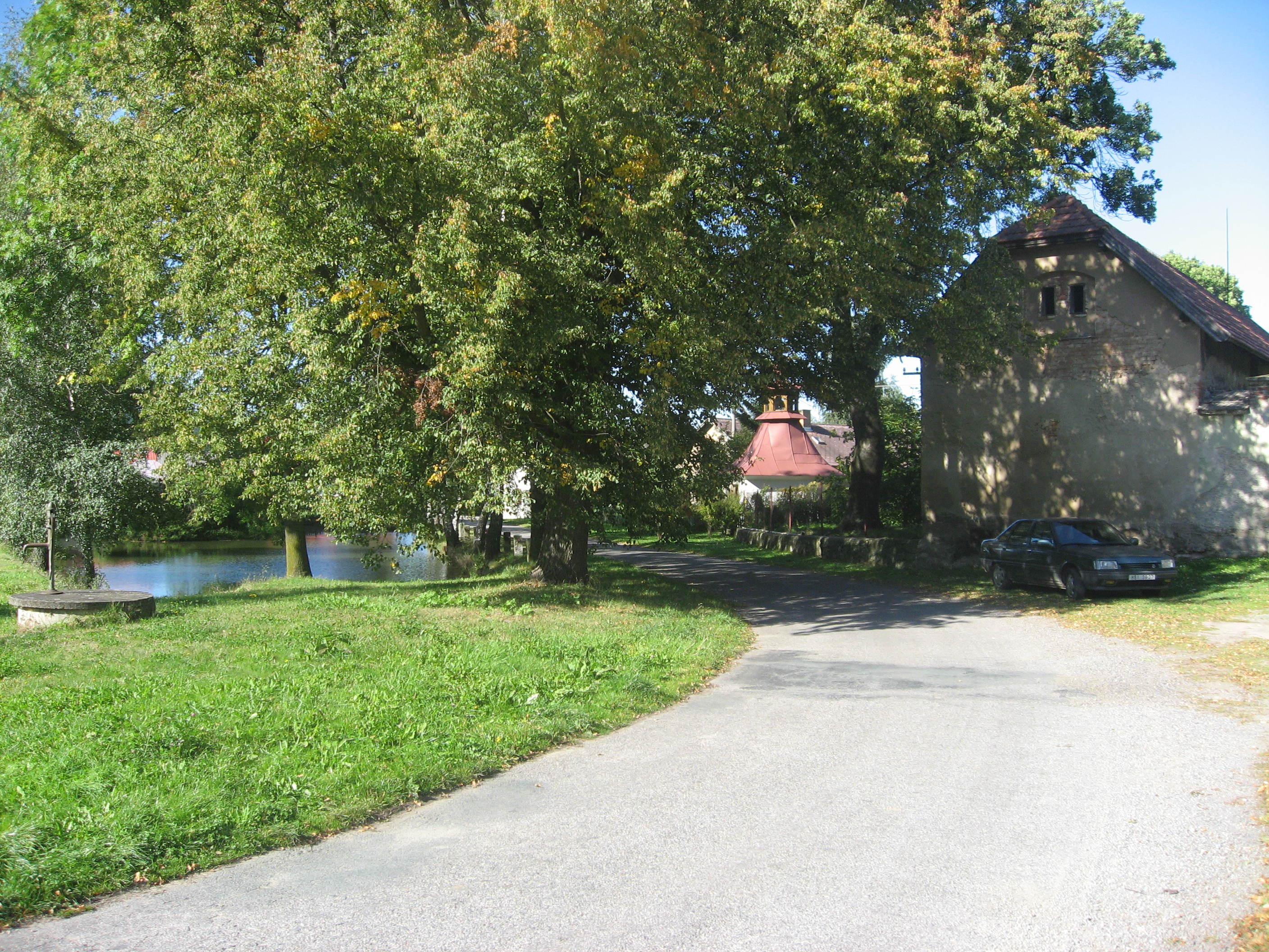 Zdislavice je vesnice, která je součástí obce Herálec